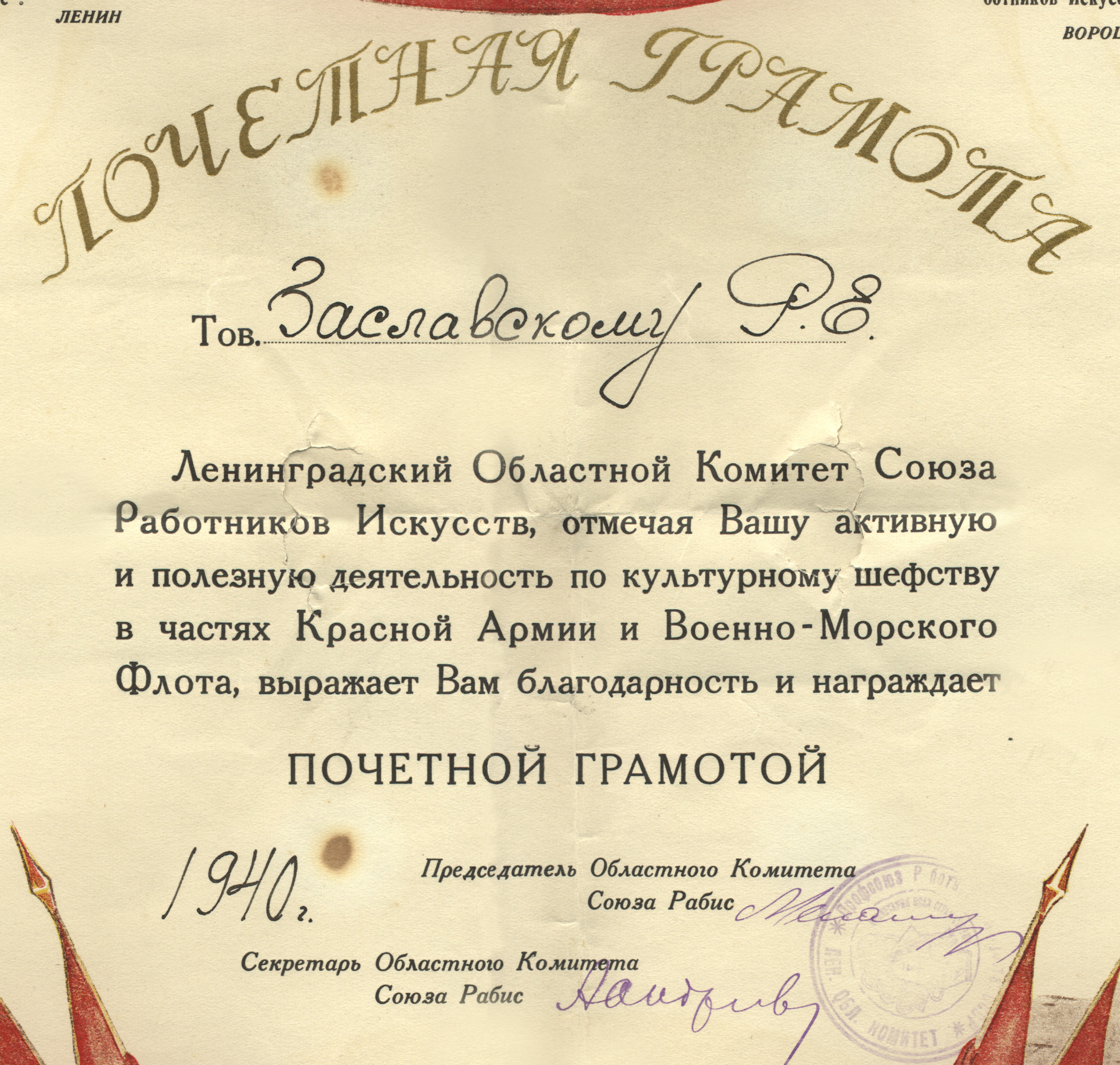 Почётная грамота Р. Е. Засласкому (фрагмент)